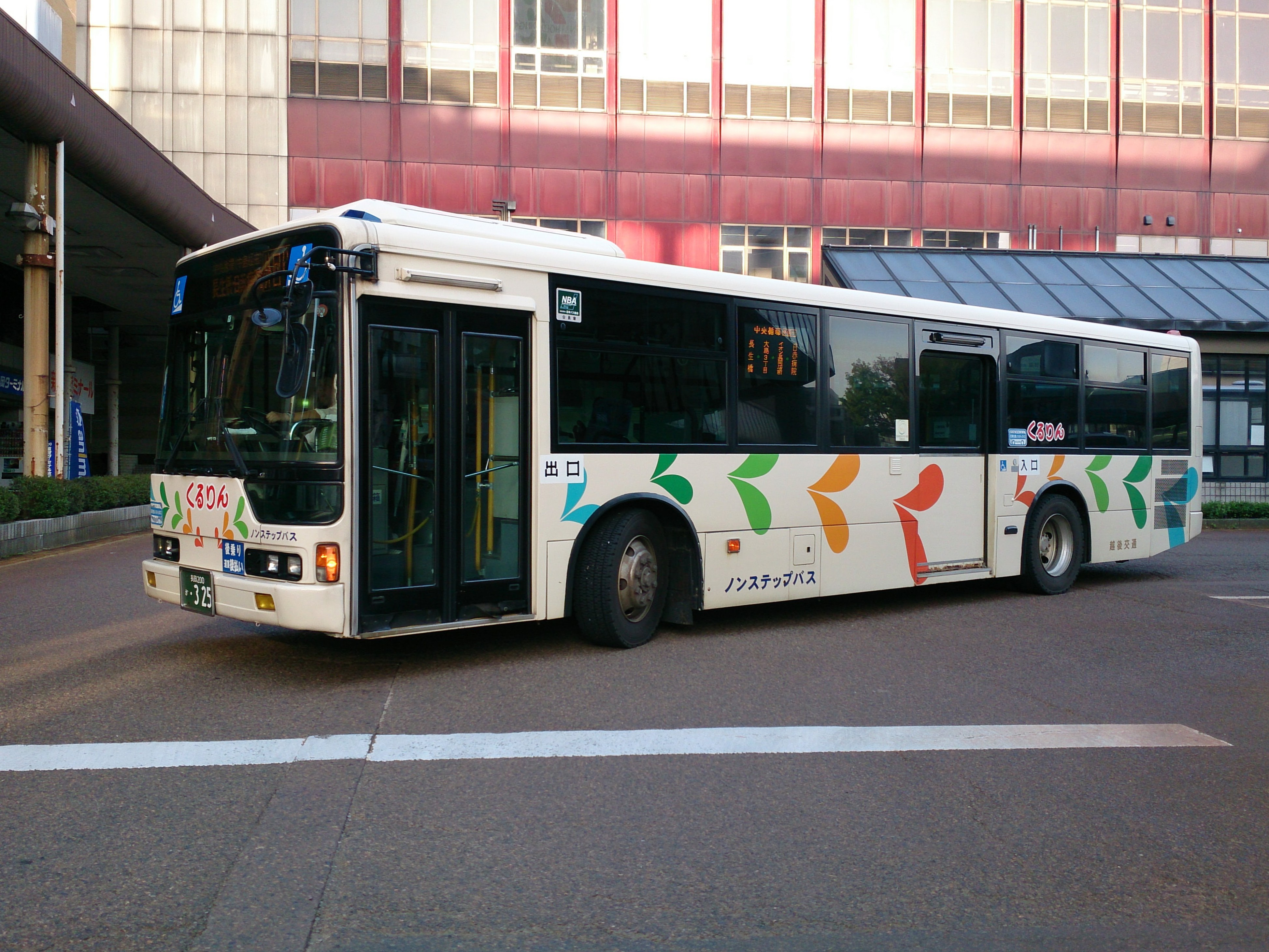 越後交通・くるりん